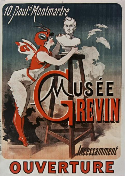 10, Boul[evar]d Montmartre, Musée Grévin, incessamment ouverture : affiche